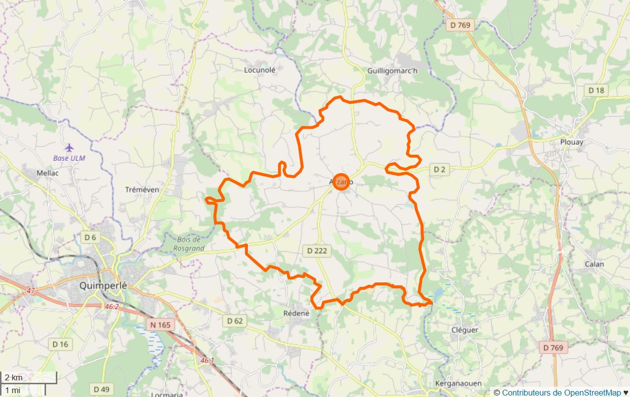 Cette carte a été créée à partir des données du projet Openstreetmap. This map may be incomplete, and may contain errors. Don't rely solely on it for navigation.